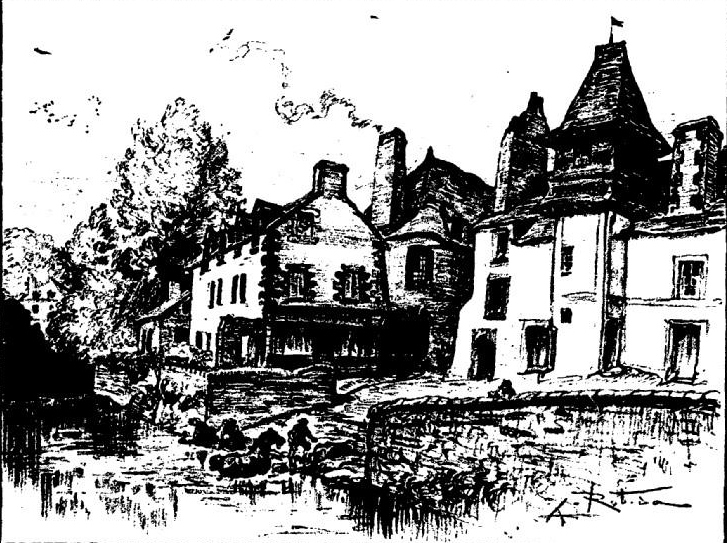 Les bords de l'Isole à Quimperlé (lithographie d'Albert Robida publiée dans "La vieille France. Bretagne" vers 1900)